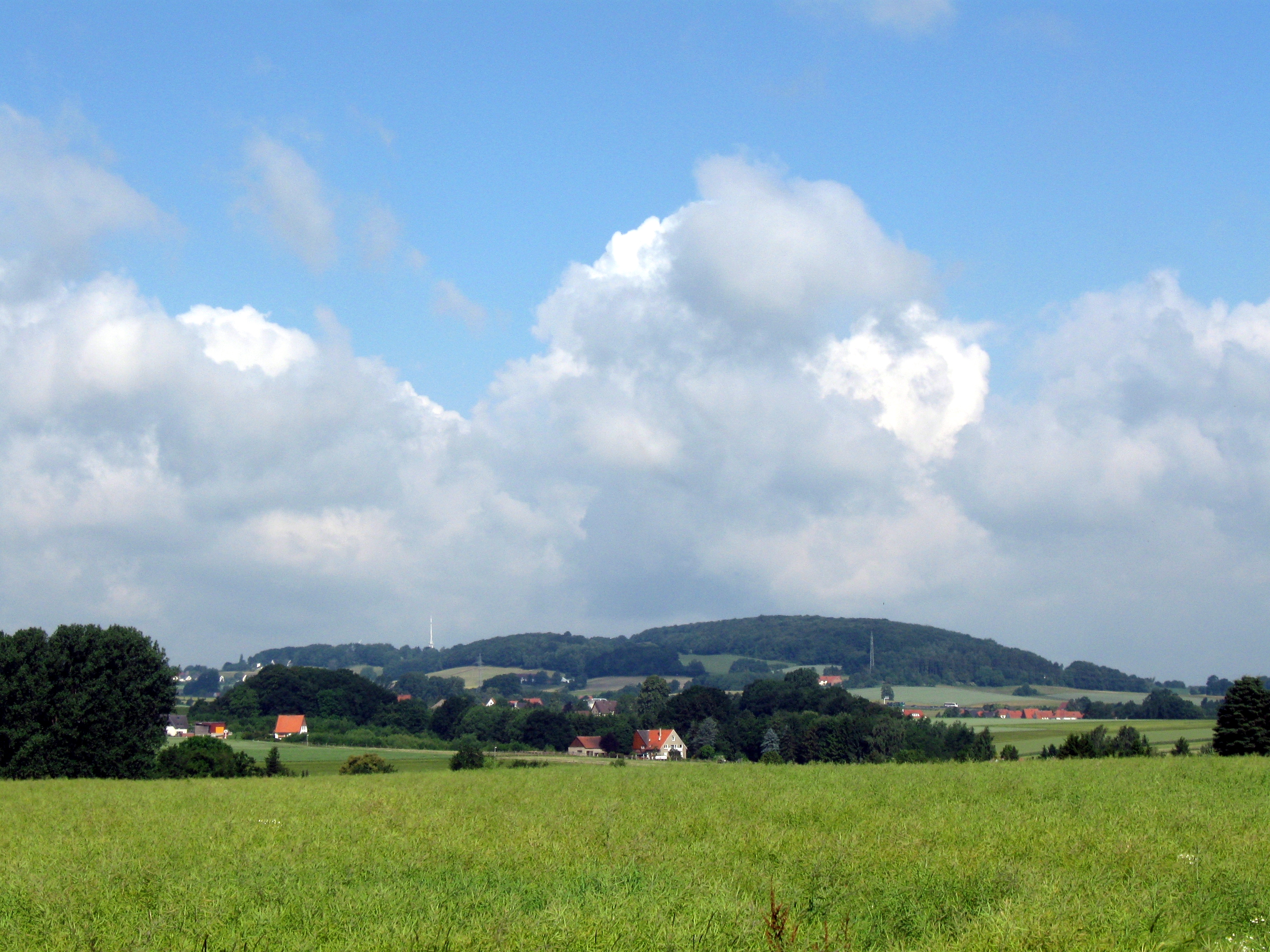 Eggerücken (links) und Dornberg im Herforder Stadtteil Schwarzenmoor, Kreis Herford, Nordrhein-Westfalen.